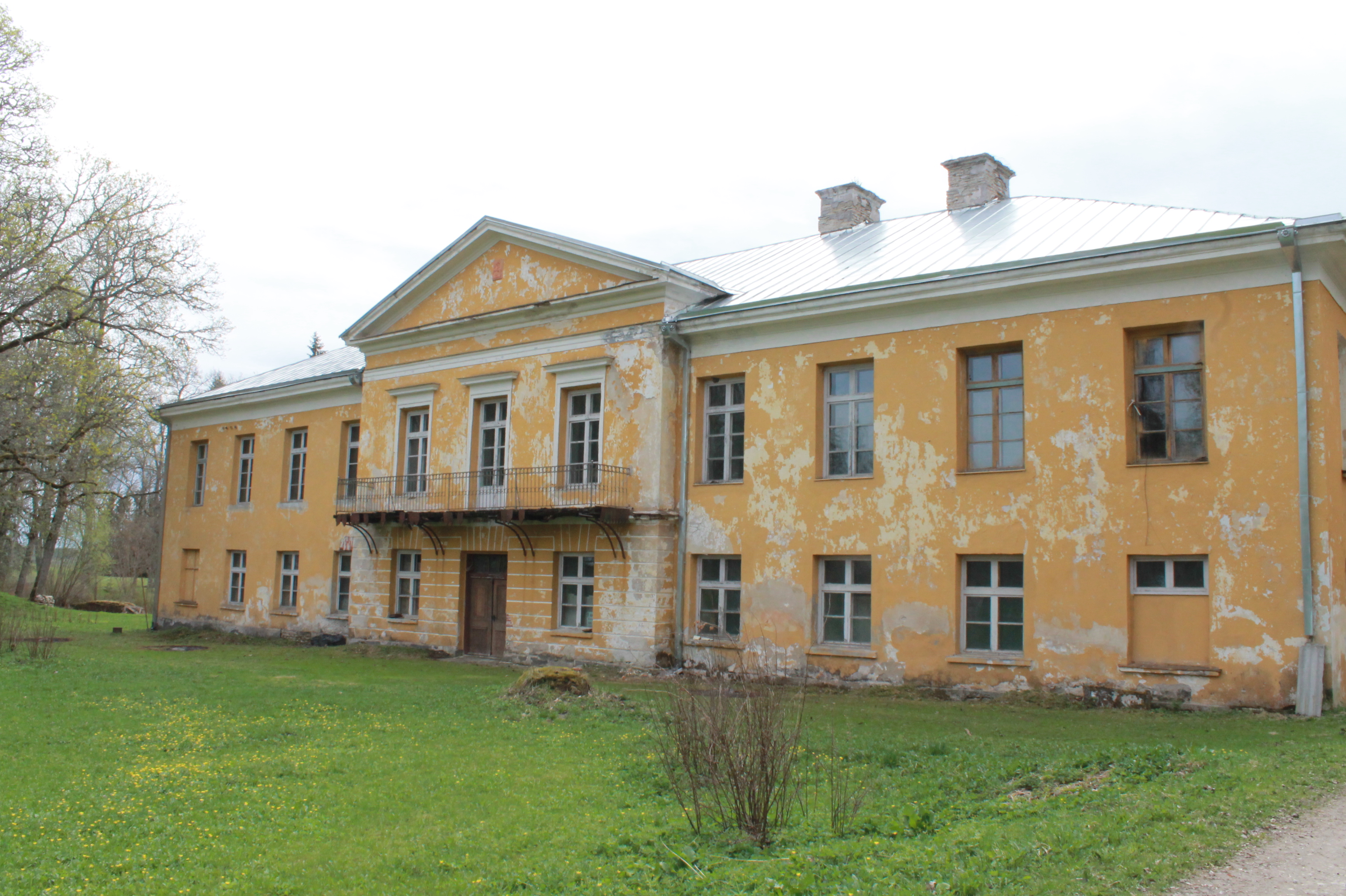 Rapla maakond, Märjamaa vald, Vaimõisa küla